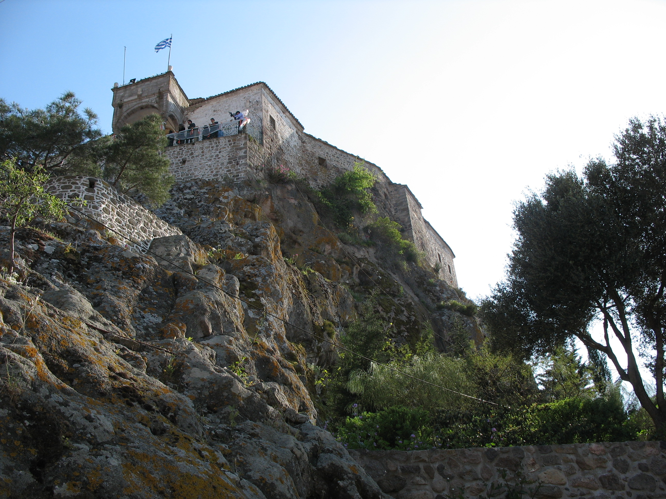 H ekklisia apo kato